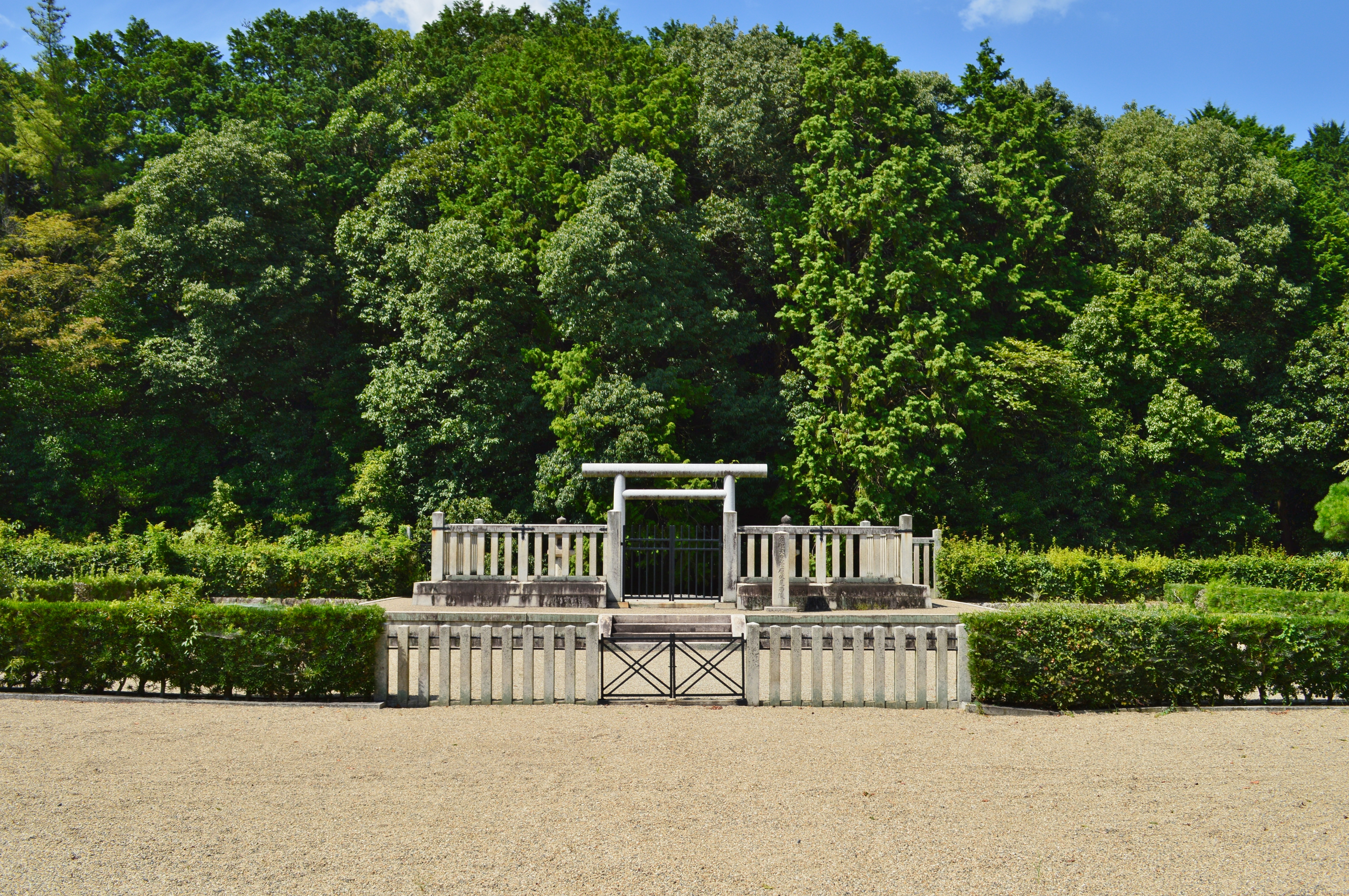 安康天皇菅原伏見西陵 拝所